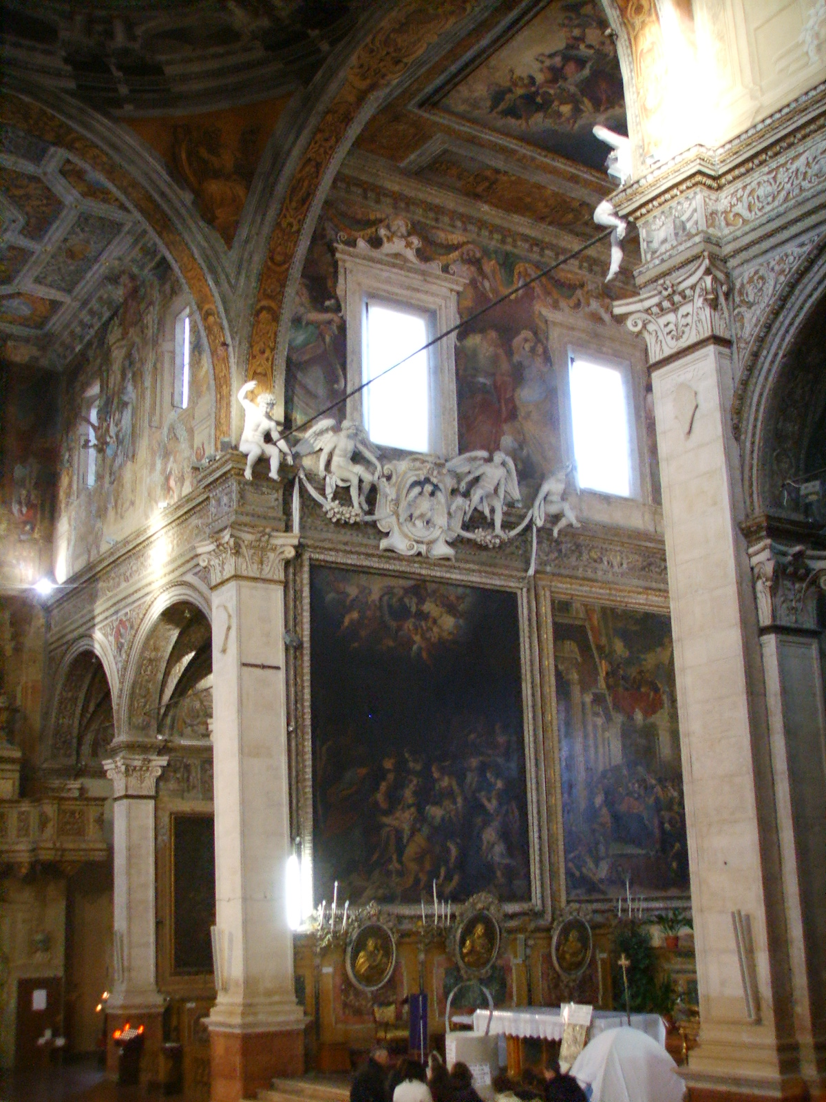 Ferrara, santa maria in vado, interno